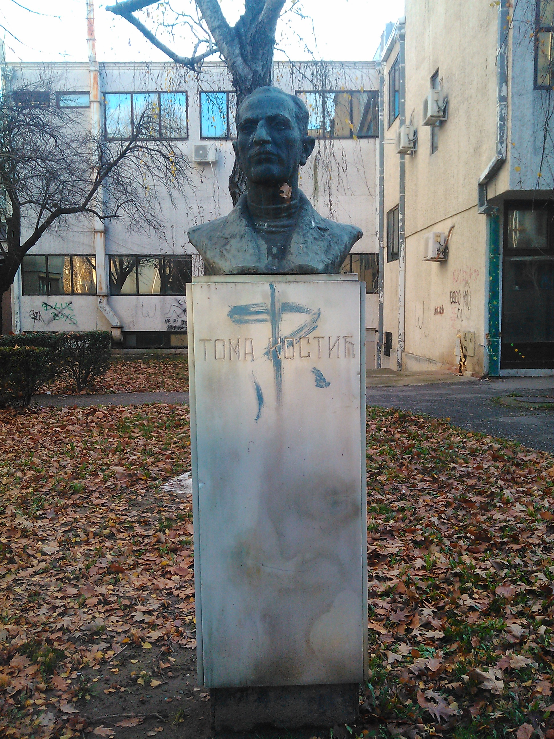 Srpski (latinica): Spomen bista Tome Kostića u naselju „Toma Kostić” u Leskovcu.